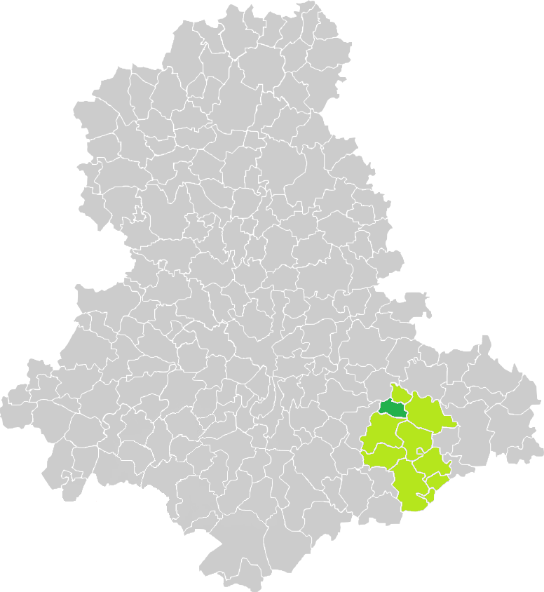 Carte de situation de la commune de Roziers-Saint-Georges (en vert foncé) dans le votre Canton (en vert clair) sur une carte des communes de la Haute-Vienne